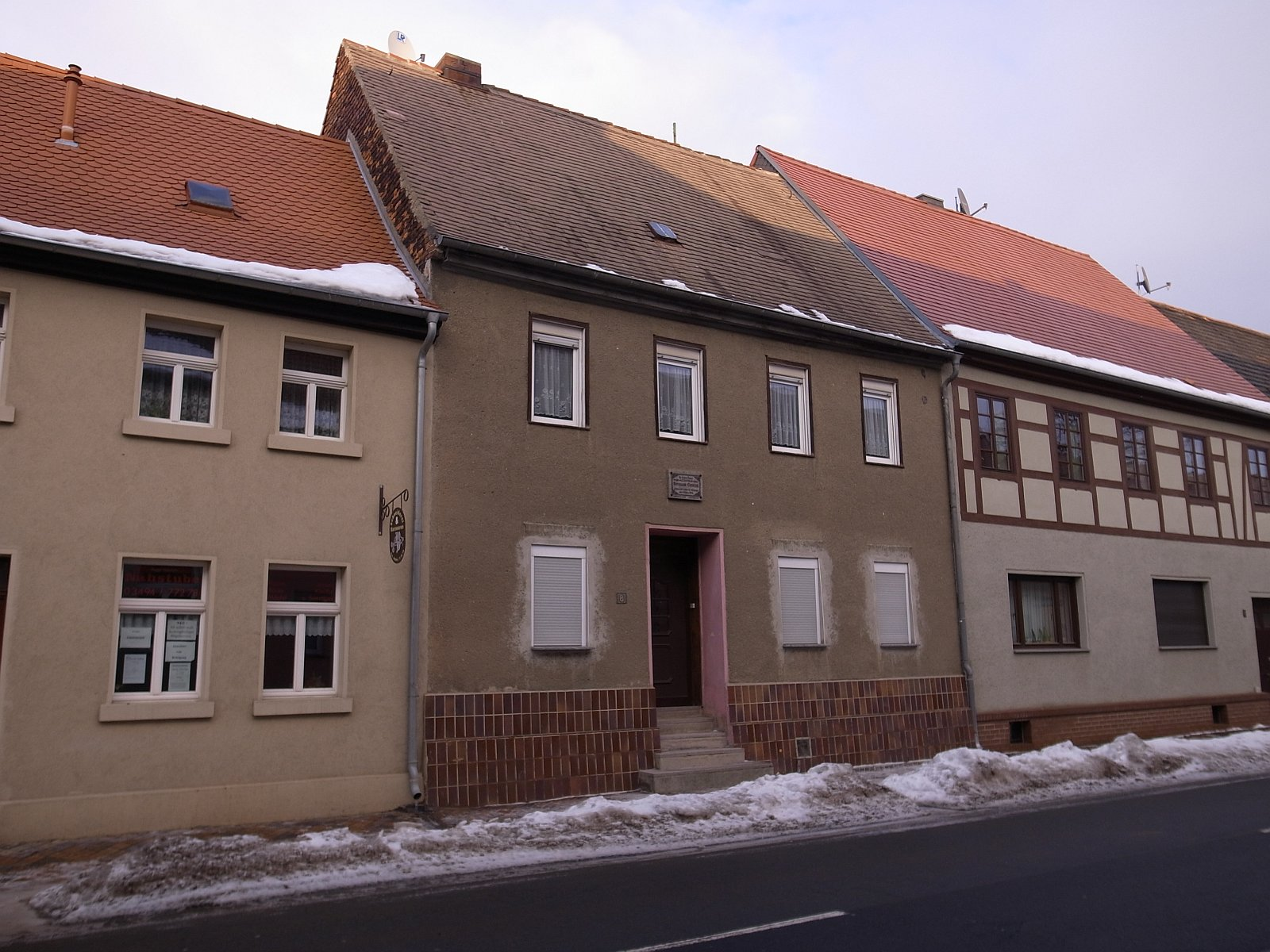 Jeßnitz, Hermann Conradi Geburtshaus, Leopoldstraße 8, Koordinaten: N51 41.039 E12 18.186